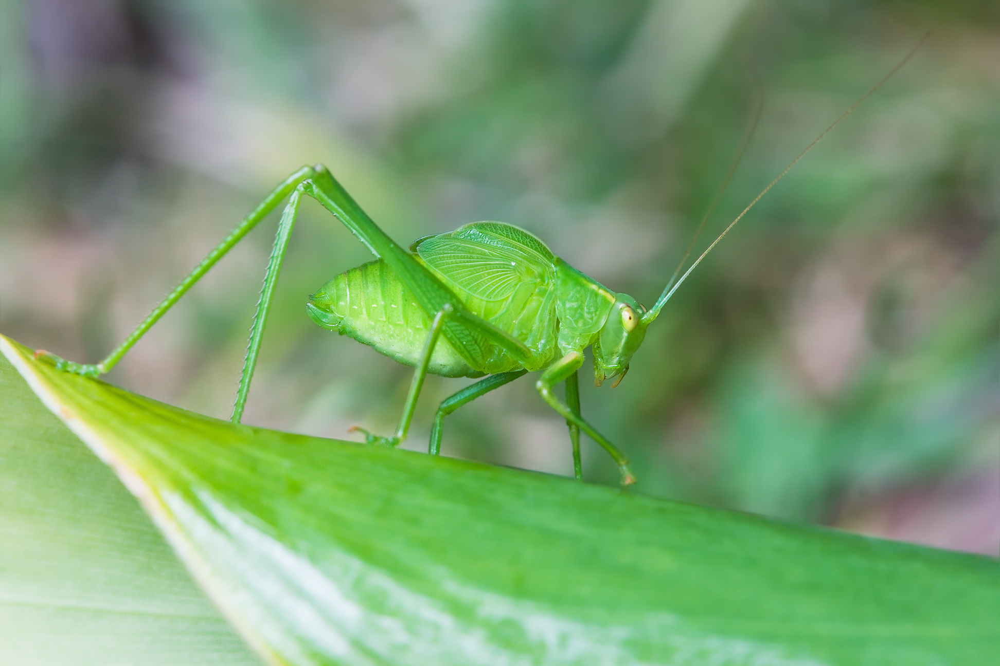 1.2 only